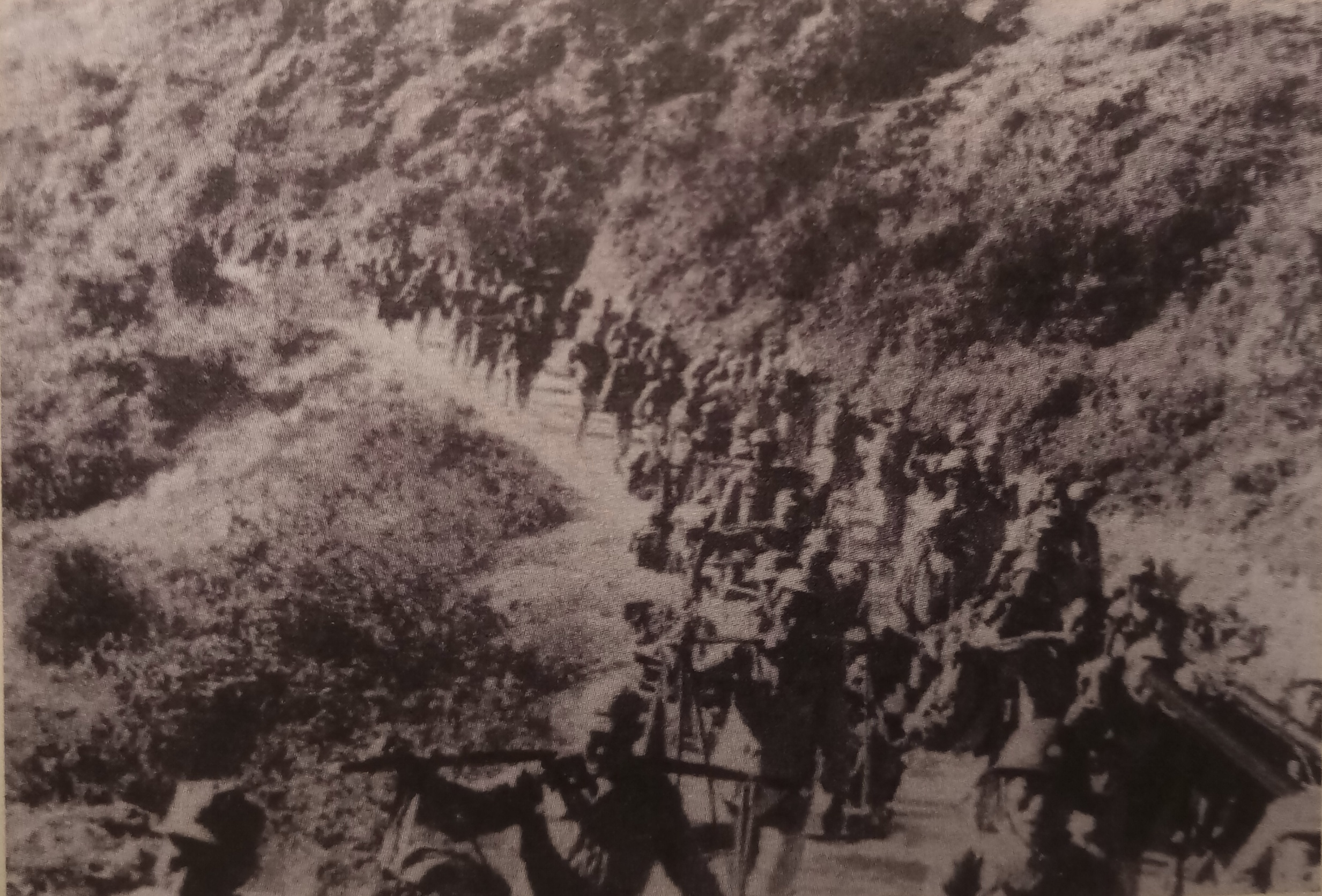 中文（中国大陆）: 国民革命军第11集团军挥师南下围剿芒市日军